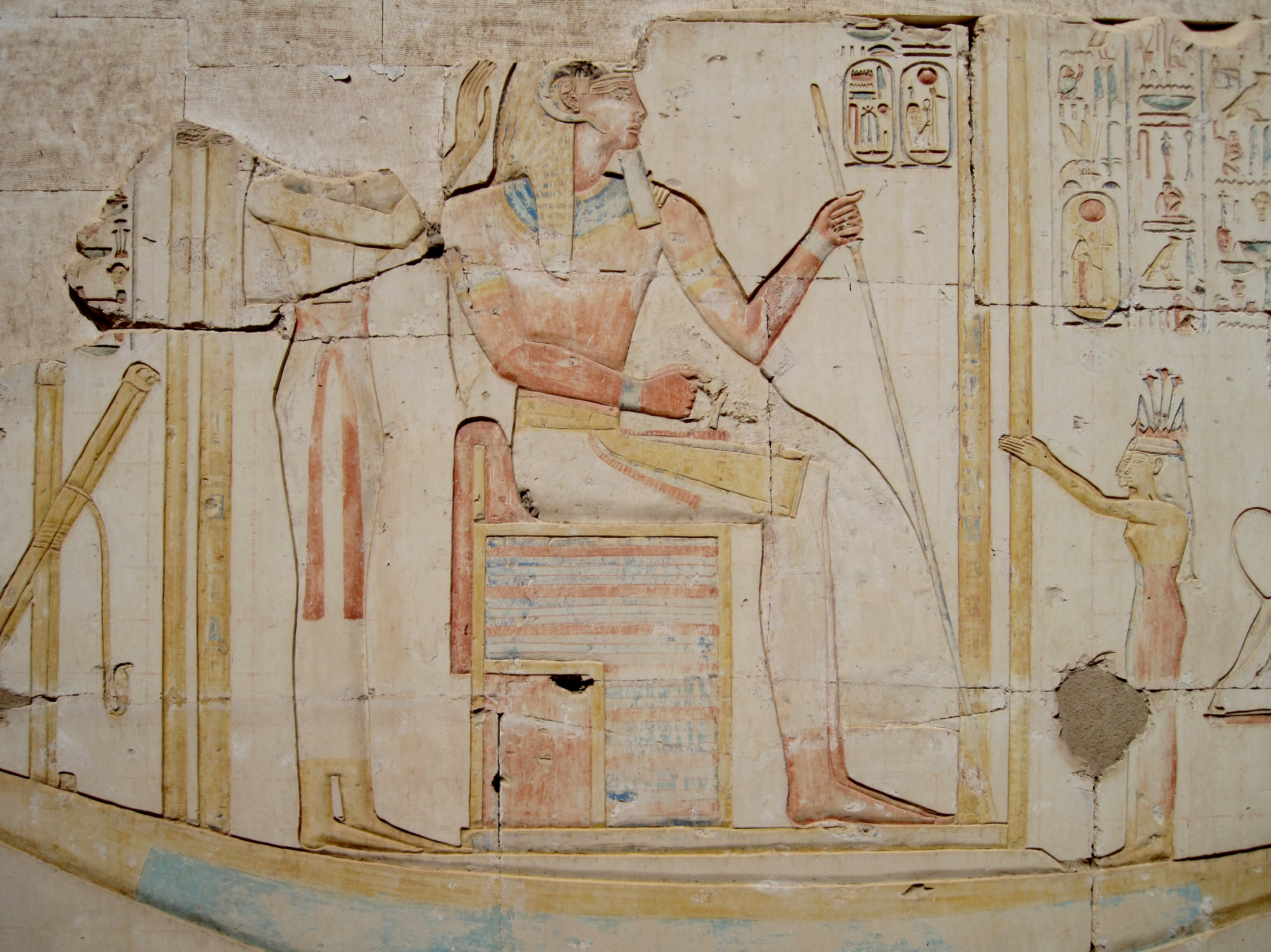 Relief im Tempel Ramses II. in Abydos, Ägypten